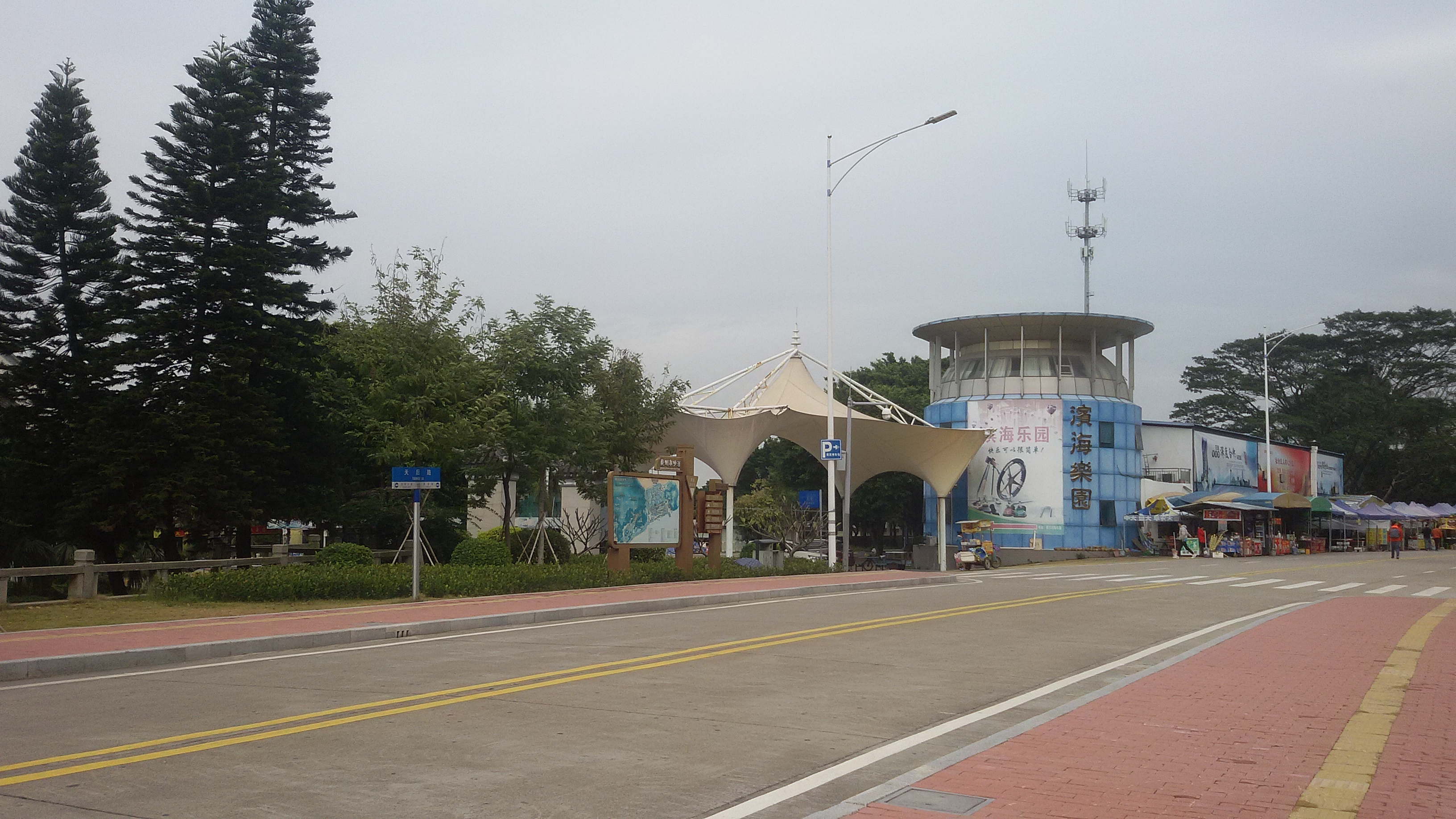 粵語: 南沙濱海樂園